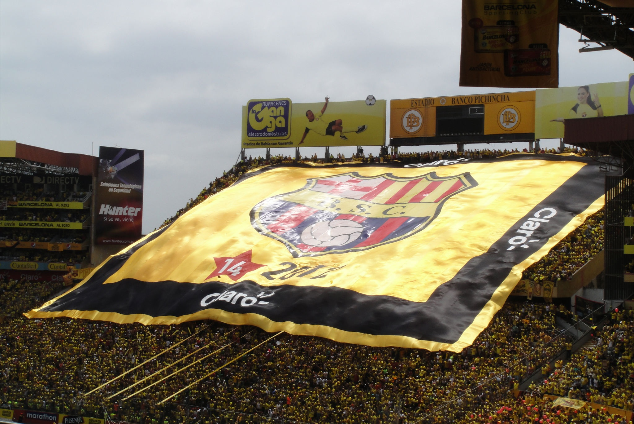 La barra Sur Oscura durante un partido de Barcelona Sporting Club de Guayaquil, Ecuador